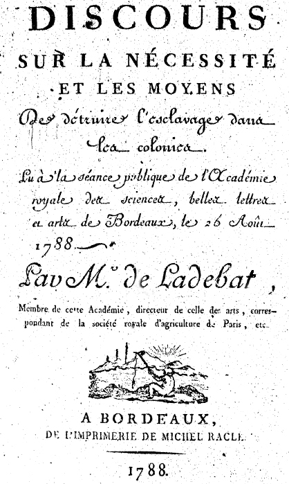 Première page du discours